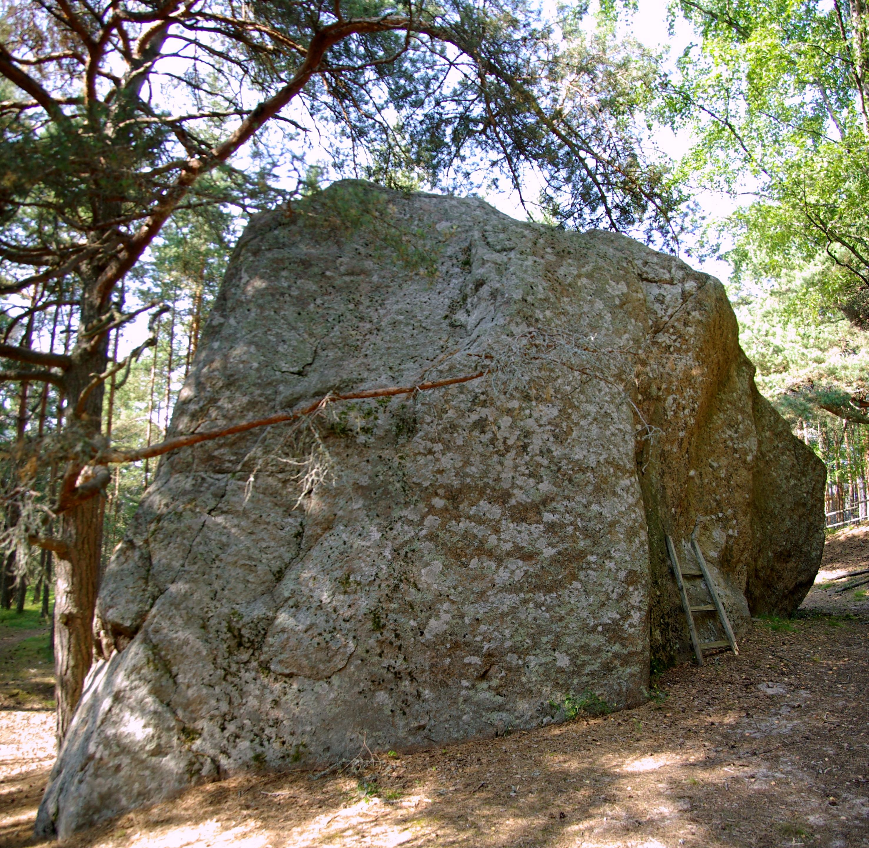 asub Harjumaal Jõelähtme vallas Haapse küla lähistel